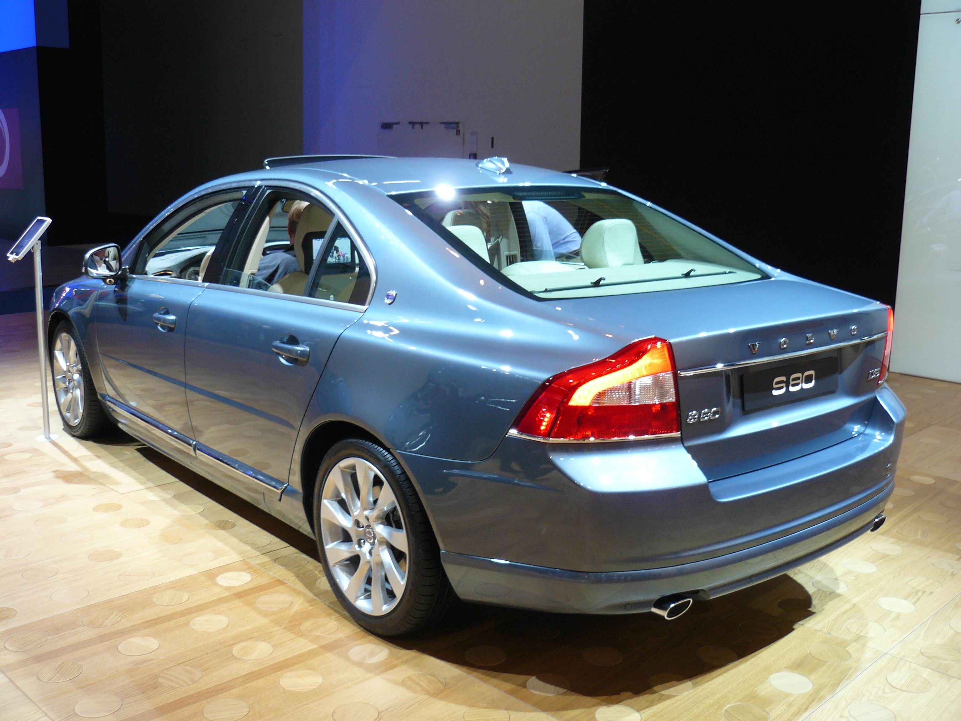 Francfort 2011